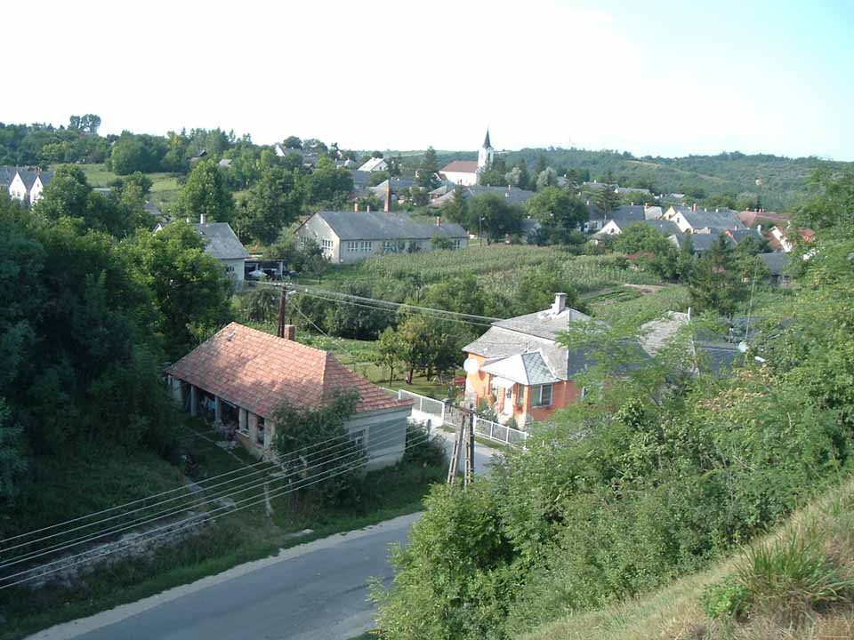 Jásd , Hungary